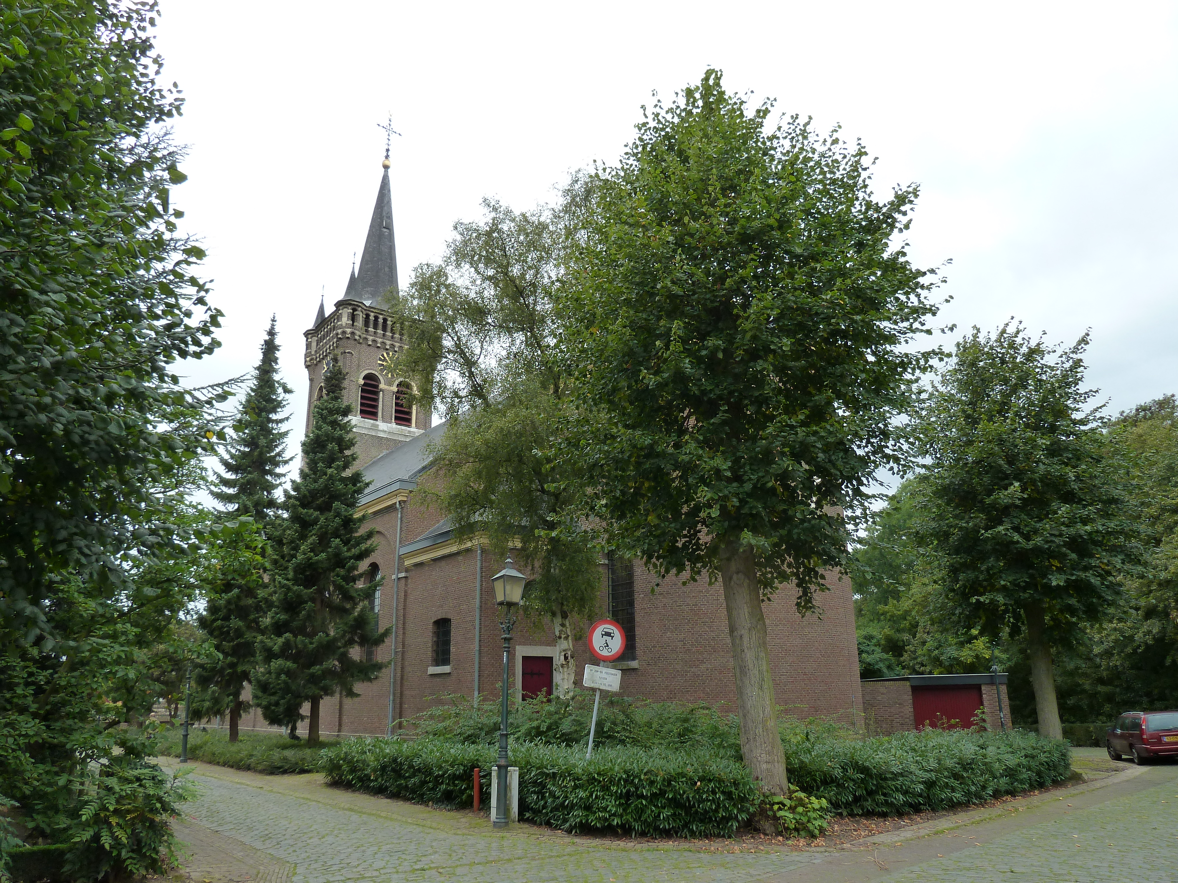 Sint-Augustinuskerk, Elsloo, Limburg, Nederland